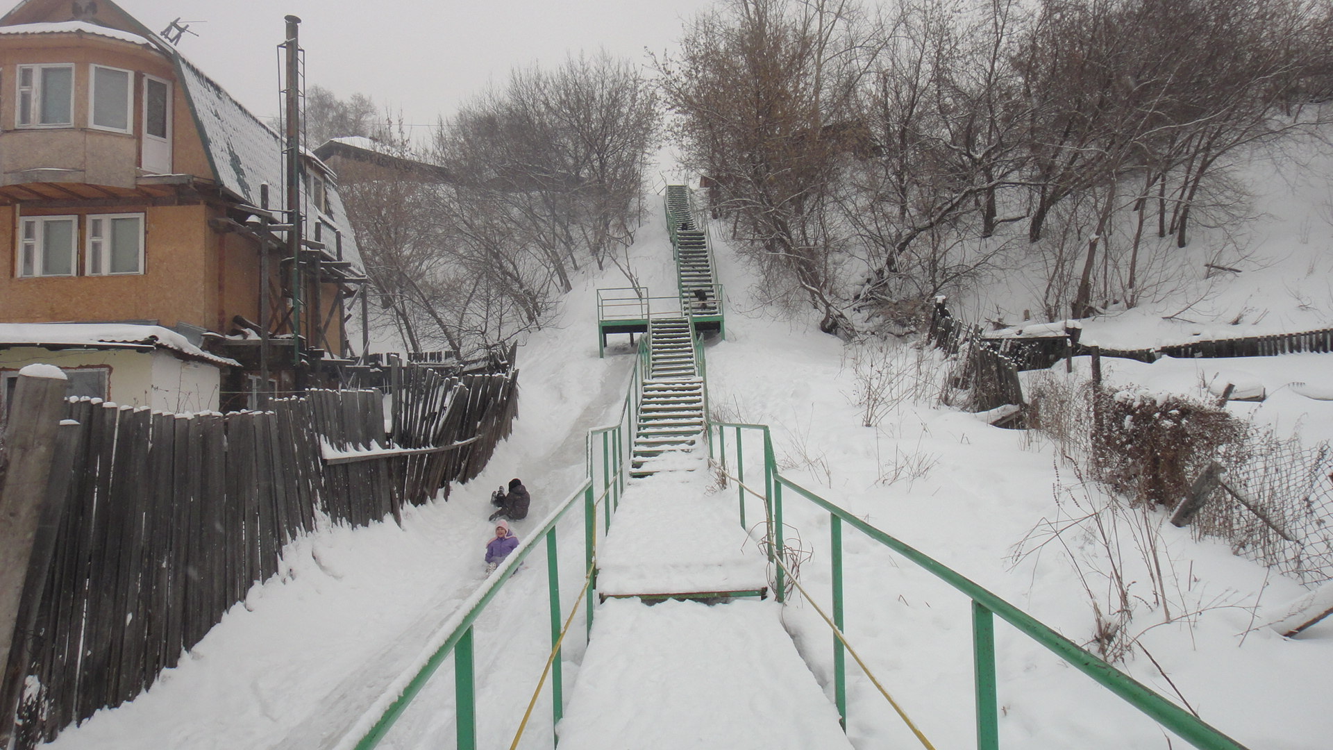 Воскресенская гора в Томске